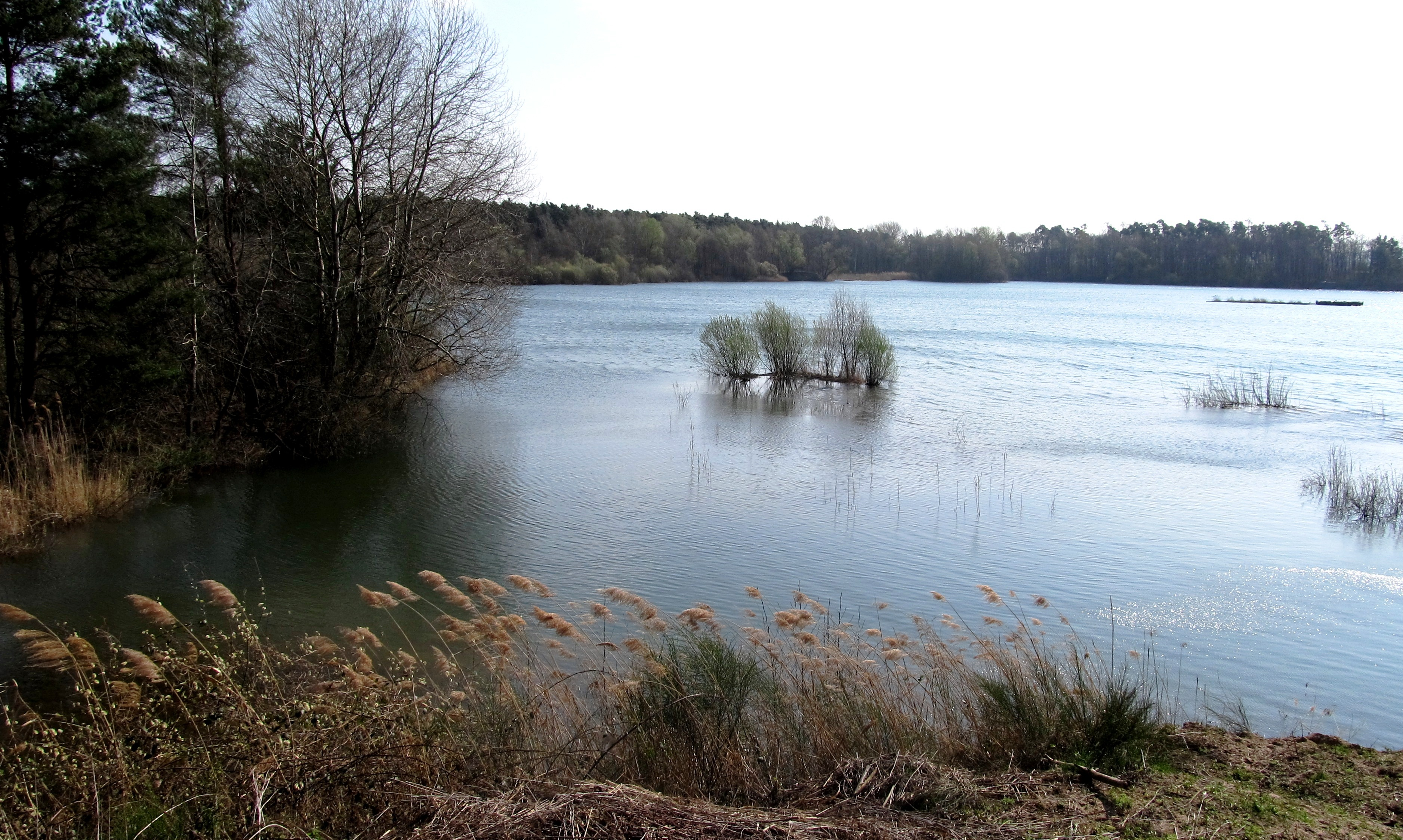 Blick auf die ausgedehnten Wasserflächen des Naturschutzgebiets Kohlplattenschlag